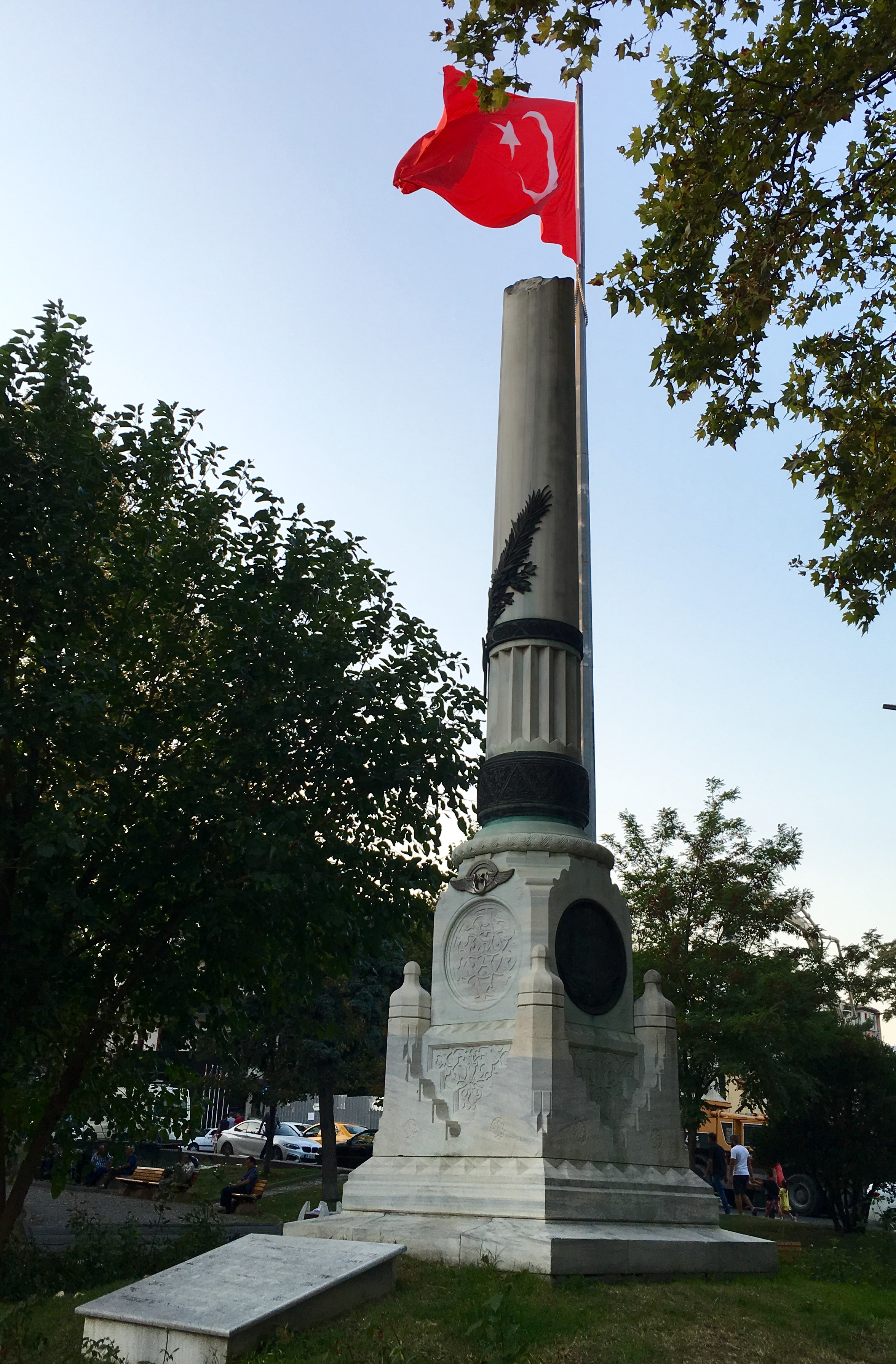 Tayyare Şehitleri Anıtının 2016'da çekilmiş güncel fotoğrafıdır.